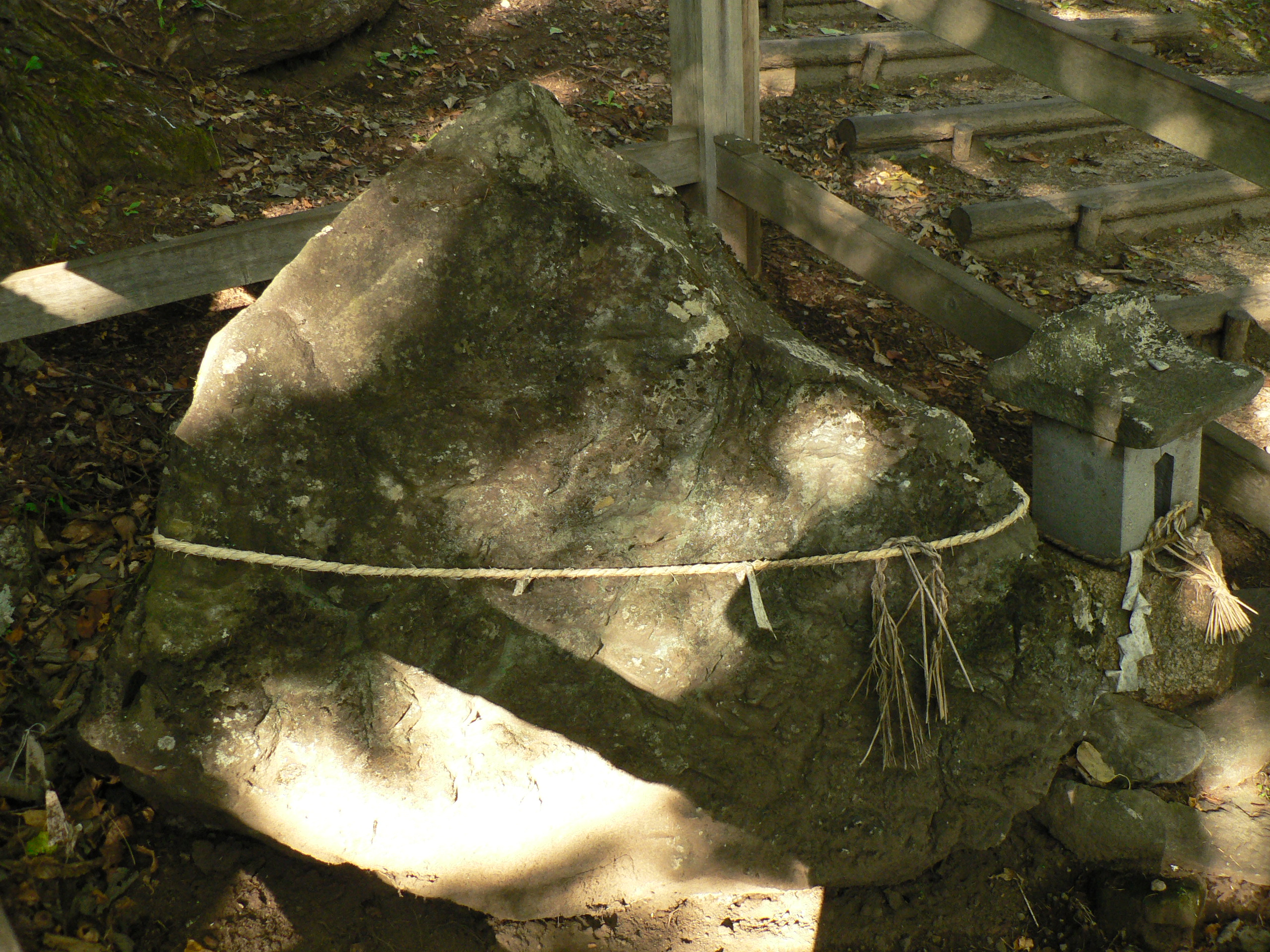 尖石遺跡の名前の由来となった尖石（とがりいし）。石質は八ヶ岳噴出の安山岩。古くから信仰の対象となっていた。長野県茅野市。